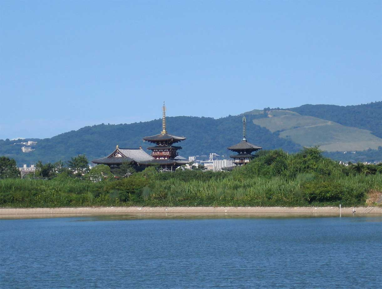 Yakushi-ji and Wakakusayama viewed from Oh-ike pond in Nishinokyo.